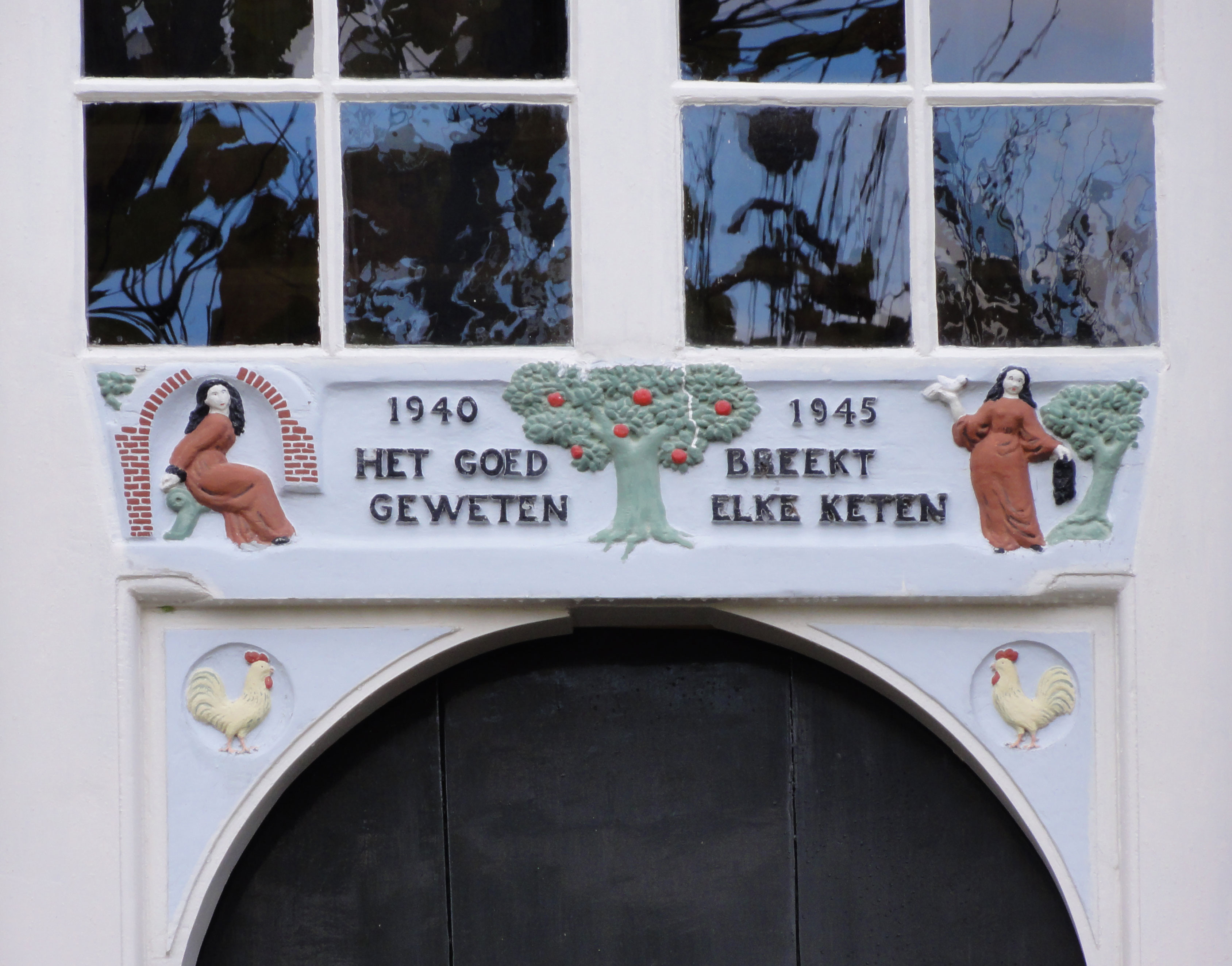 Tussenlanen 11 Bergambacht (detail)